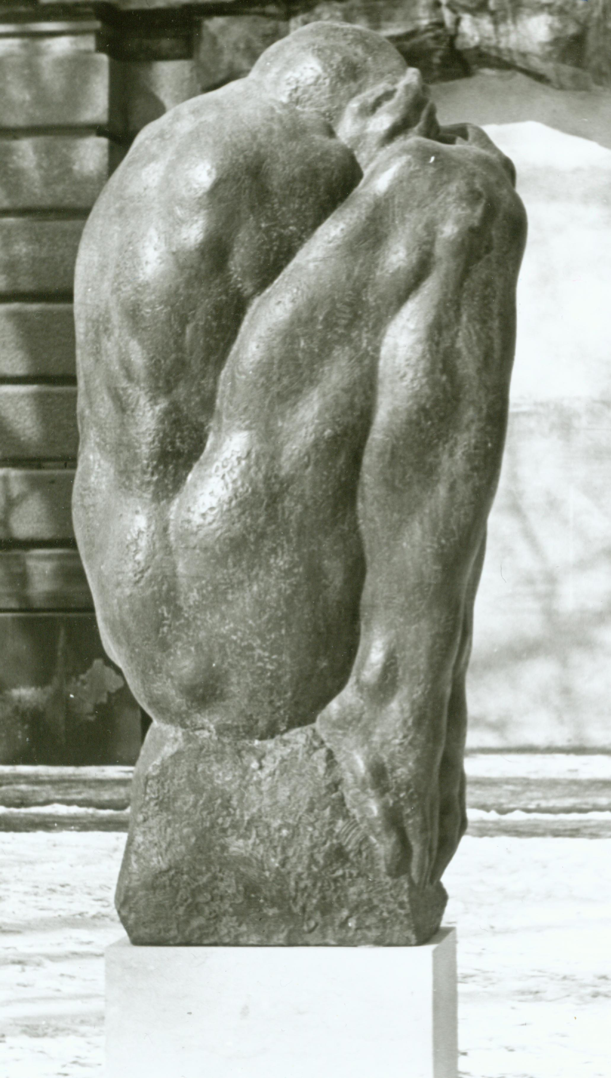 Bronze, Höhe 220cm